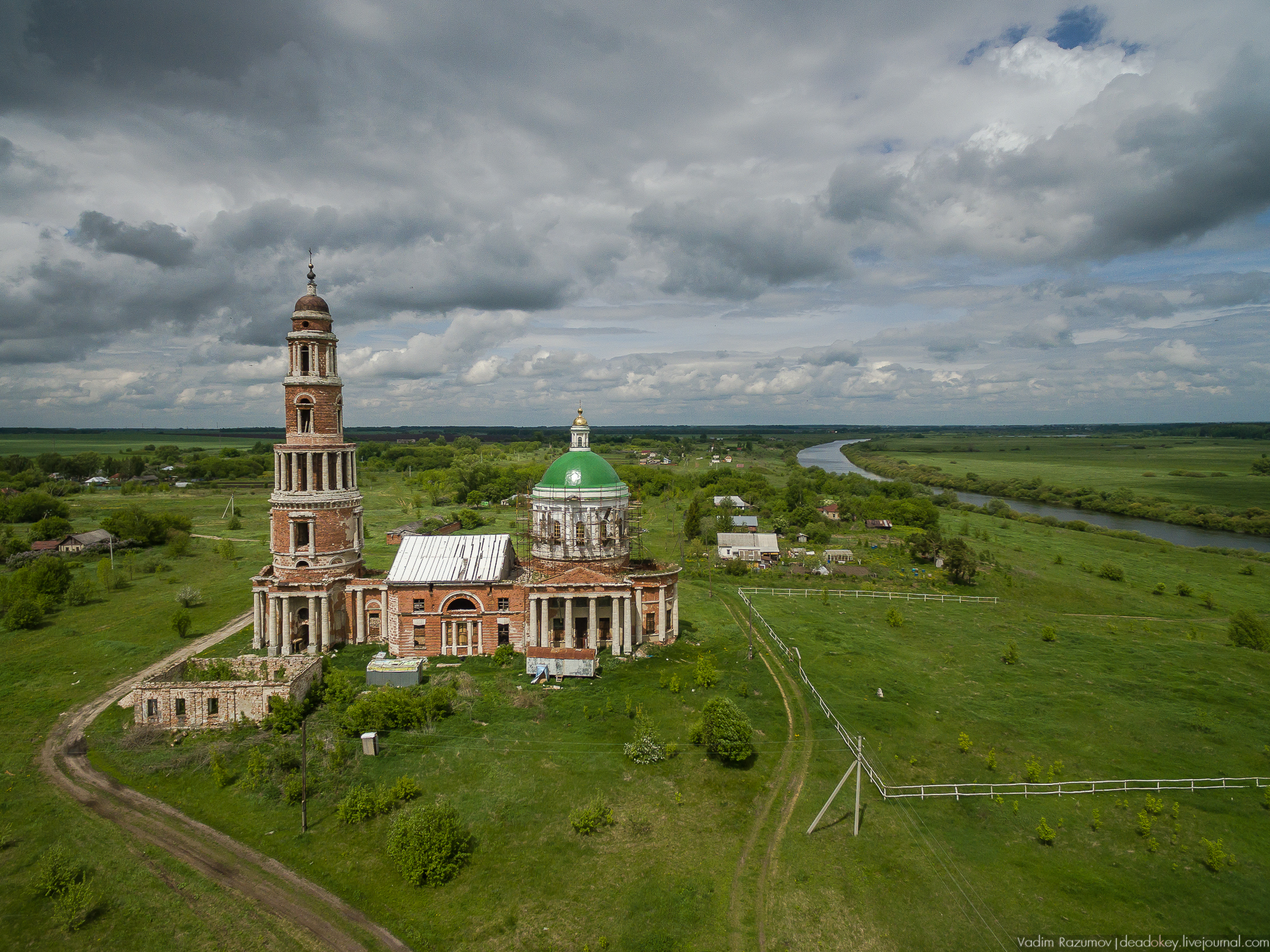 Церковь Рождества Пресвятой Богородицы: Перевлес, Старожиловский район, Рязанская область